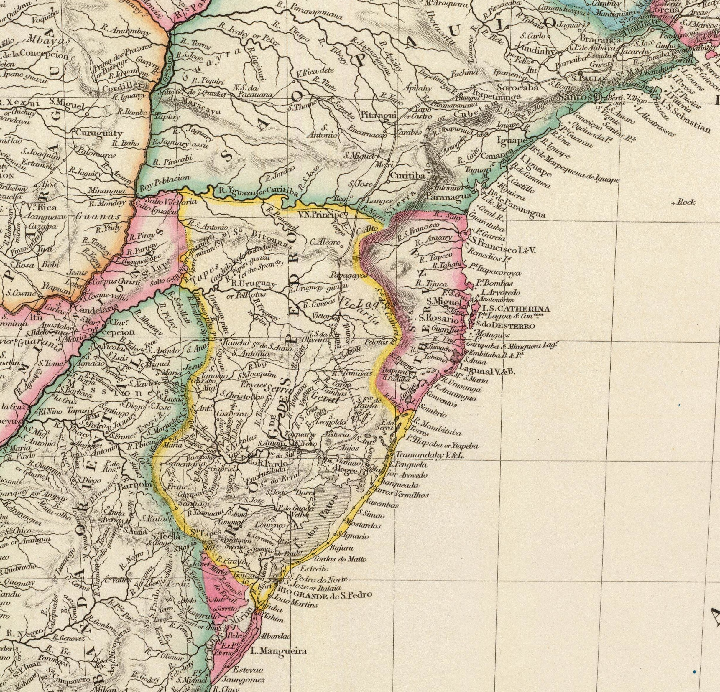 Províncias do Sul do Brasil, em detalhe do mapa "Brazil" (1844), de John Arrowsmith.